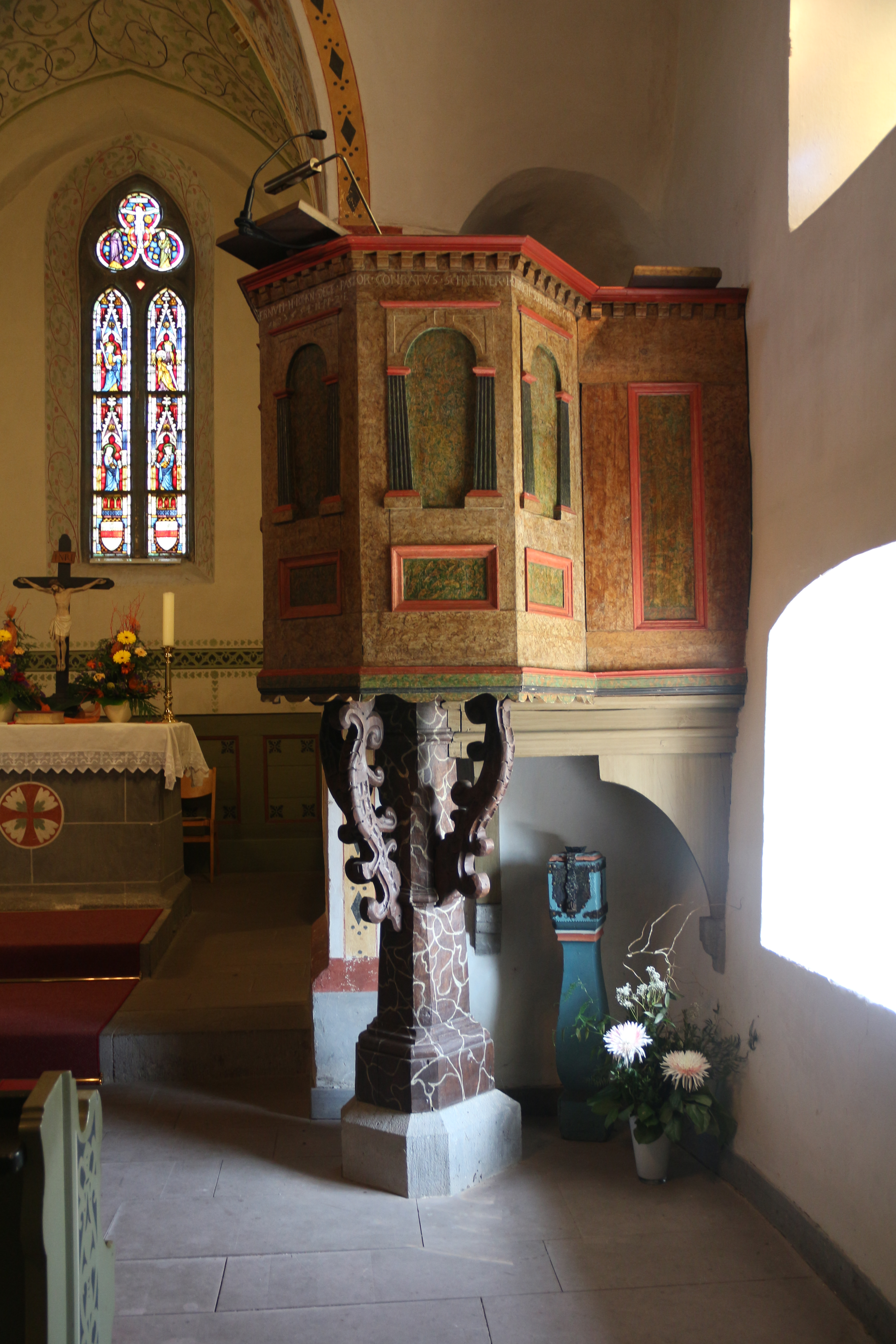 Kirche in Winnen